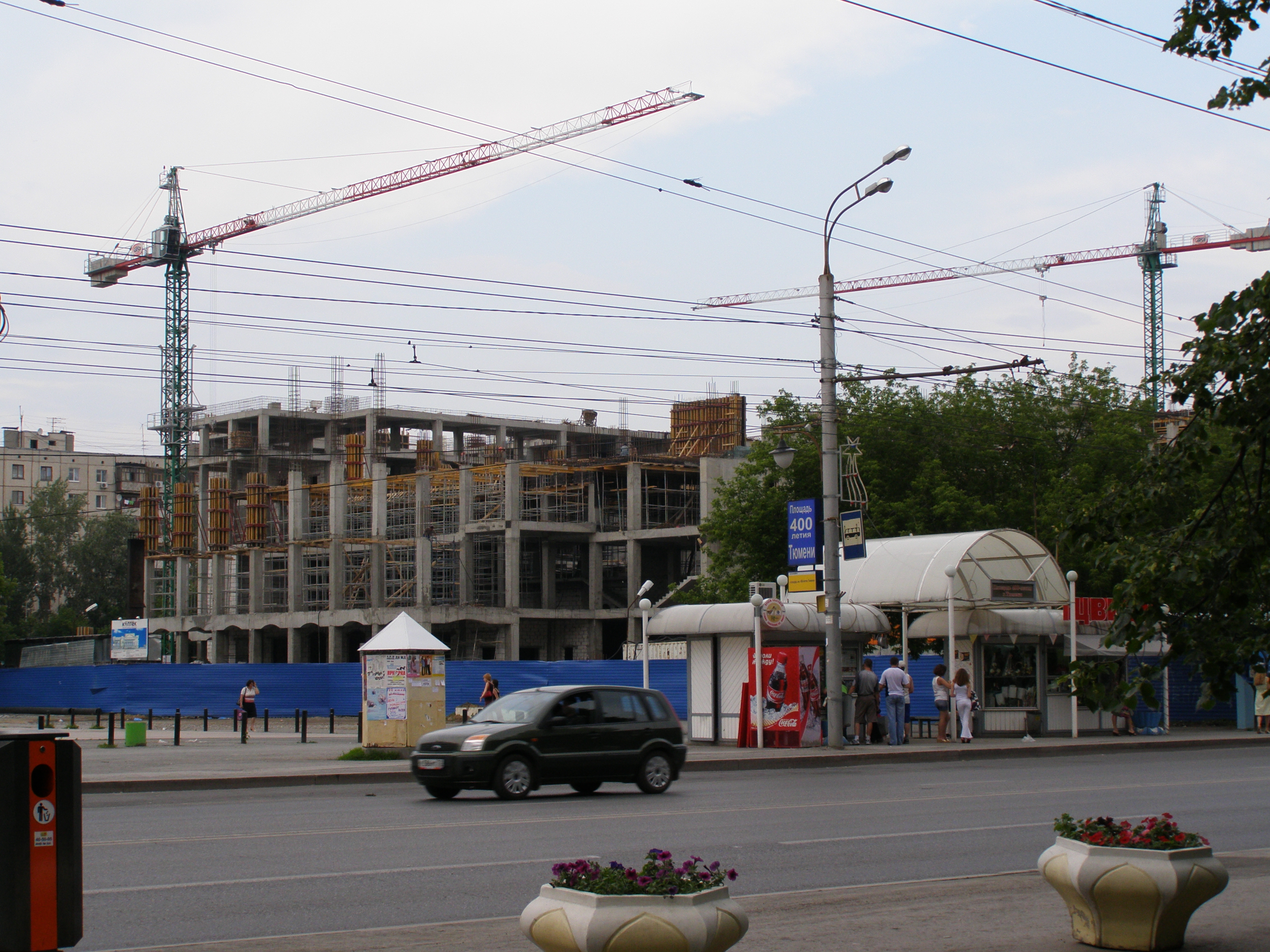 Konstruado de la Tjumena provinca drama teatro. Tjumeno, Rusio.